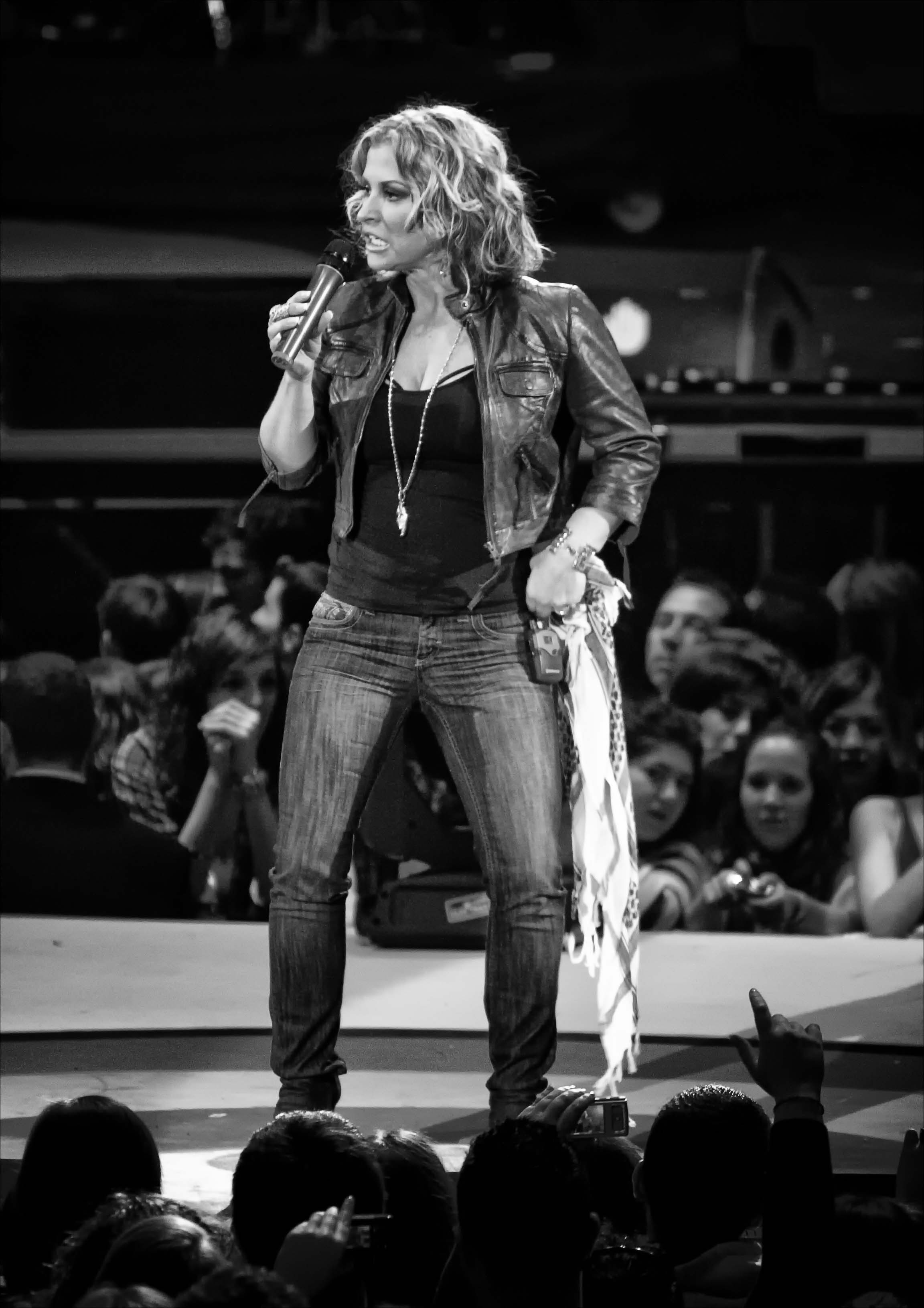 Anastacia Premios 40 Principales, Palacio de los Deportes, 12.12.08 Madrid Spain